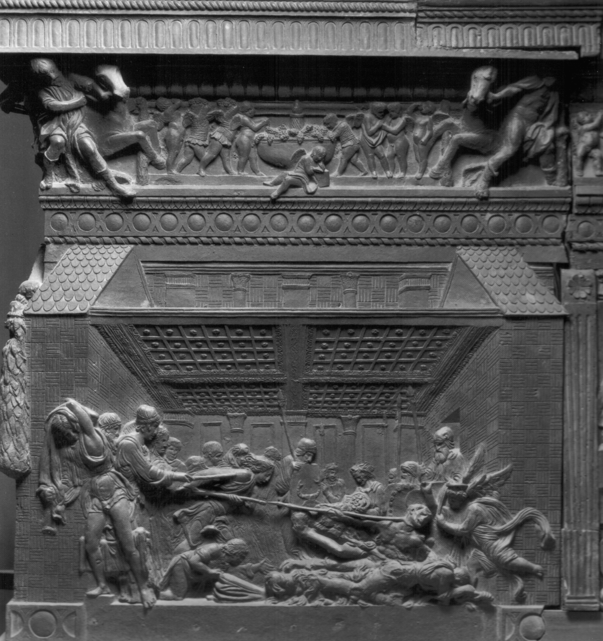 Il Pulpito della Resurrezione, in San Lorenzo a Firenze, opera di Donatello (1460s). Dettaglio: Martirio di San Lorenzo. - Fotografia Alinari, 1852.